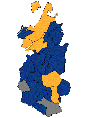 !Template:Llegenda}